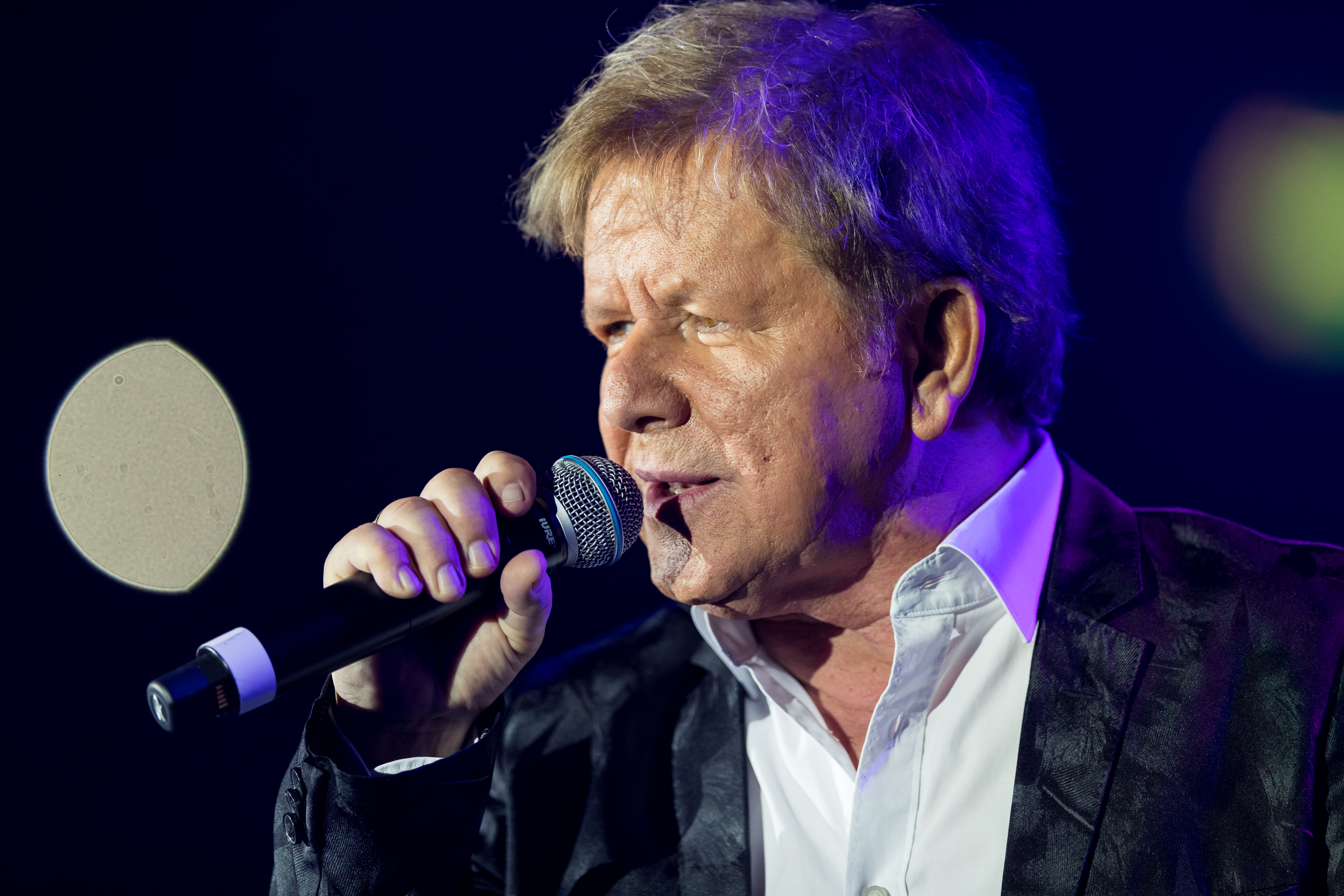 G.G. Anderson during Die Schlagernacht des Jahres at Hanns-Martin-Schleyer-Halle, Stuttgart, Baden-Württemberg, Germany on 2017-10-14, Photo: Sven Mandel